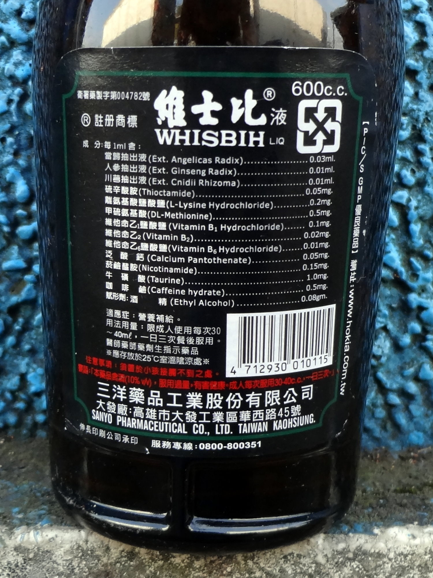 三洋藥品維士比液600cc玻璃空瓶背面標籤。